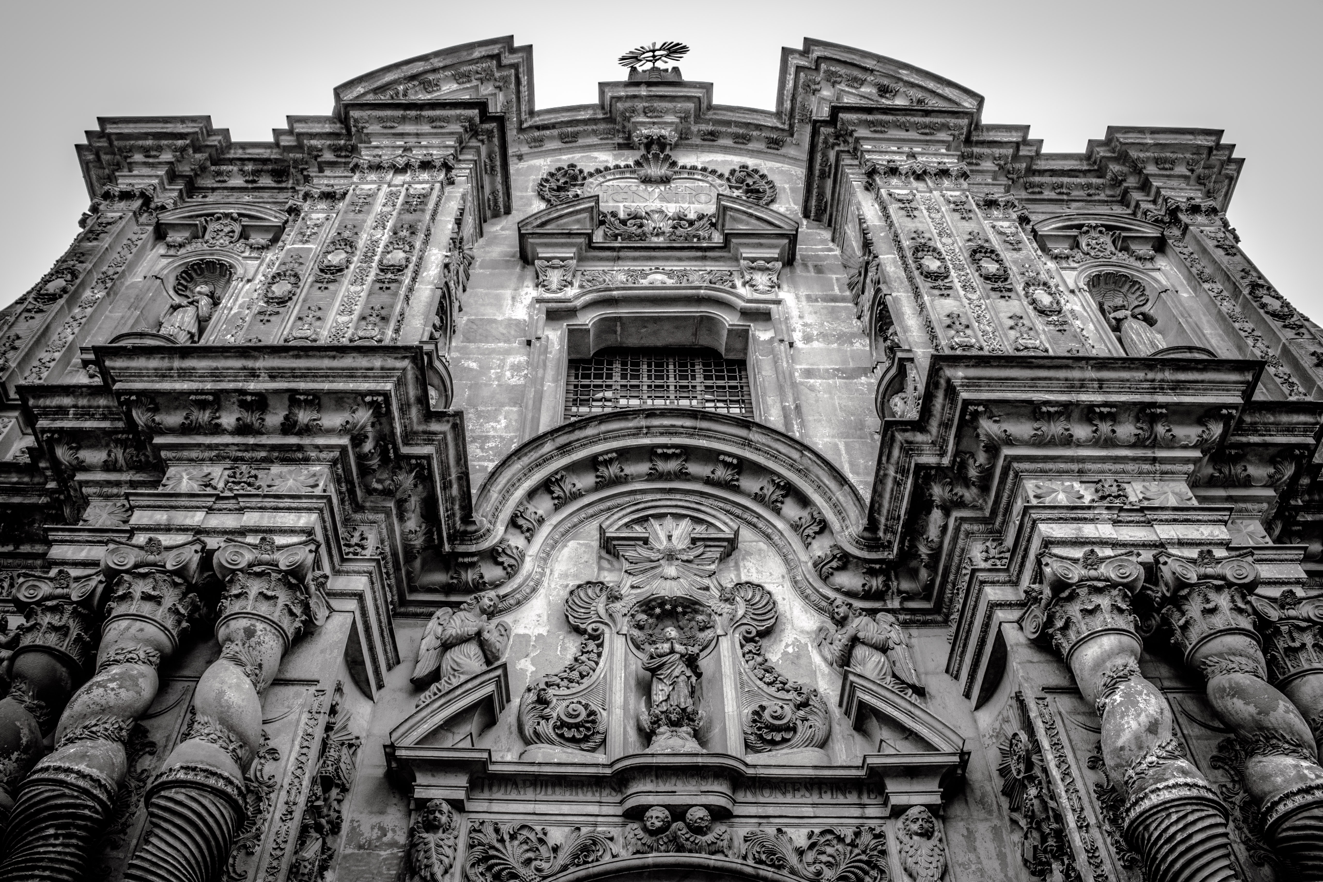 Detalle de la fachada de la Iglesia de la Compañía de Jesús - Quito